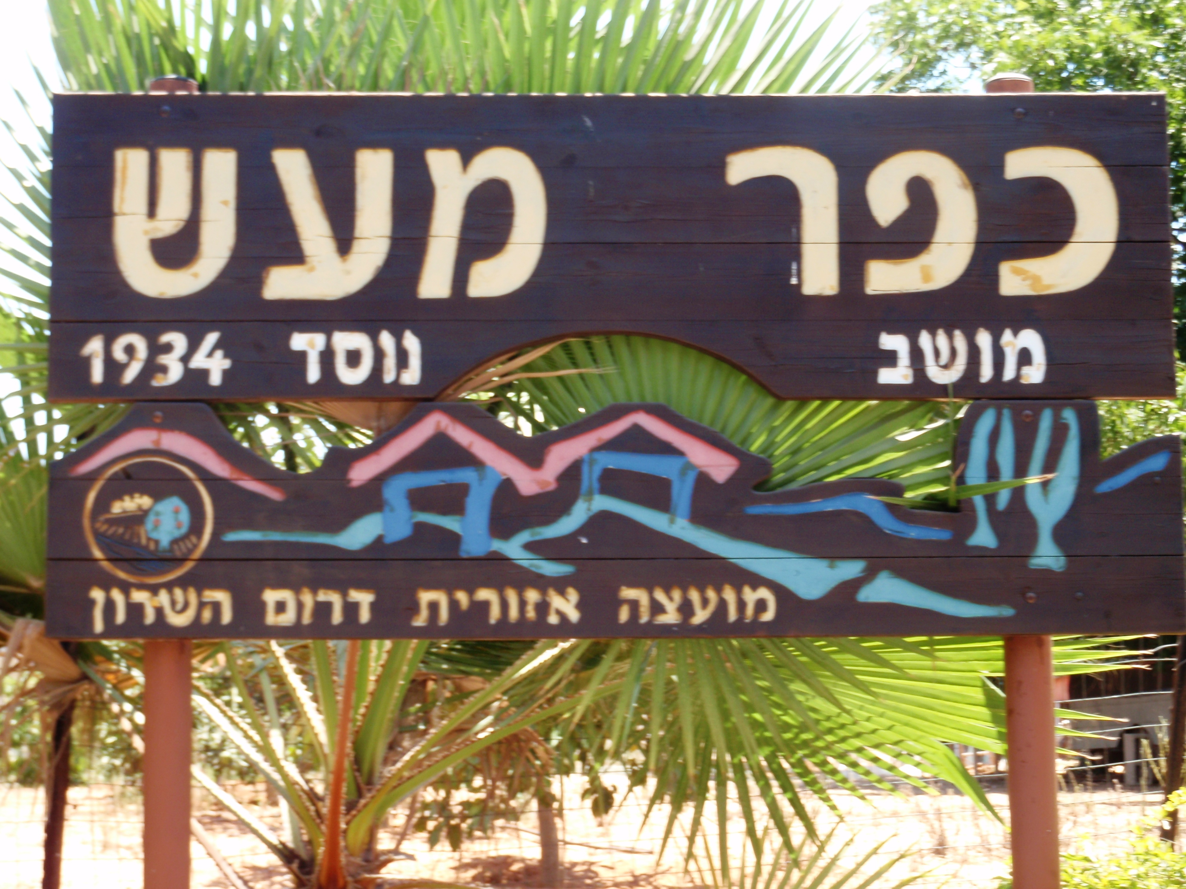 מבוא מודיעין שלט הכניסה לכפר